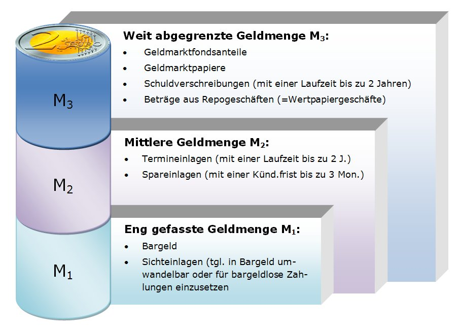 Geldmengen M1, M2, M3 der Deutschen Bundesbank